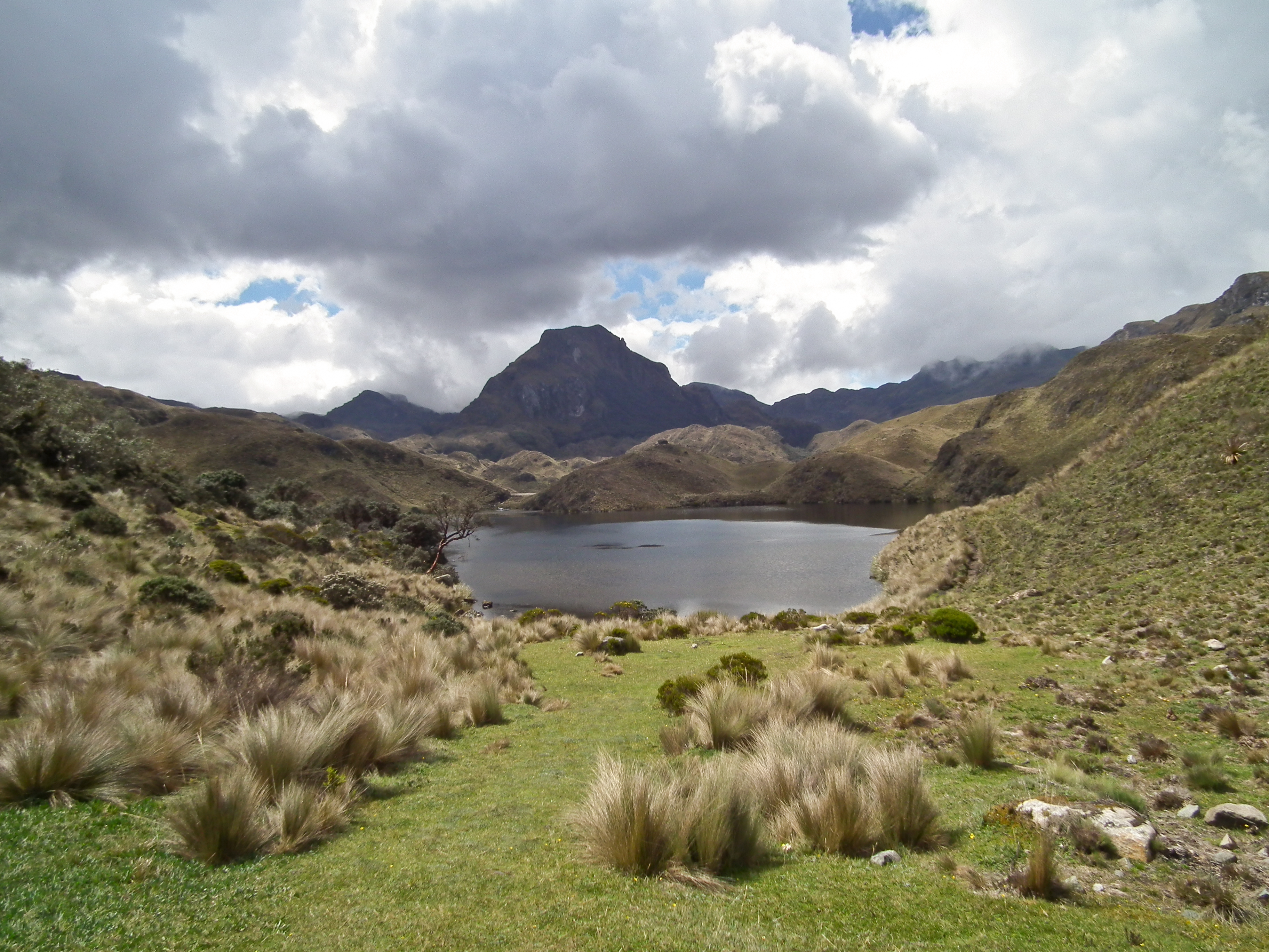 Paisaje Parque Nacional El Cajas - Ecuador